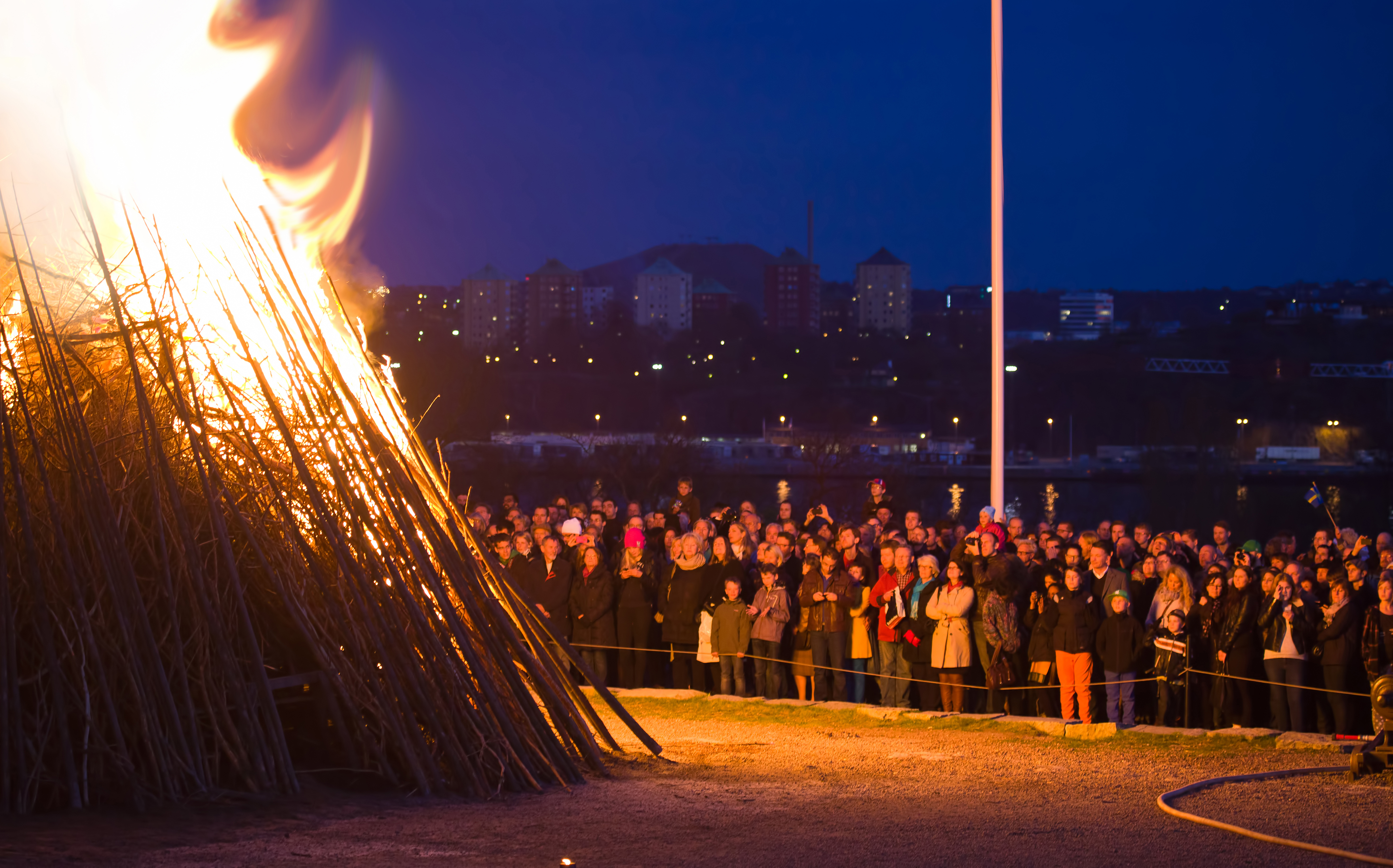 Valborgsmässoafton Skansen Stockholm 2012